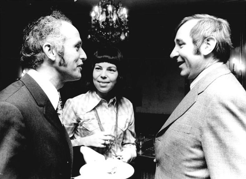 ADN-ZB-Katscherowski-12.12.73-Bu-Berlin: Heinrich-Heine-Preis 1973 verliehen - Der Lyrikerin Sarah Kirsch und dem Schriftsteller Gerhard Holtz-Baumert wurde am 12.12.73 in der Staatsoper Berlin der Heinrich-Heine-Preis 1973 verliehen, der anläßlich des 100. Todestages des Dichters 1956 vom Ministerrat der DDR gestiftet und seitdem jährlich vergeben wird. Hier v.l.n.r.: Klaus Höpcke, Stellvertreter des Ministers für Kultur, im Gespräch mit Sarah Kirsch und Gerhard Holtz-Baumert.